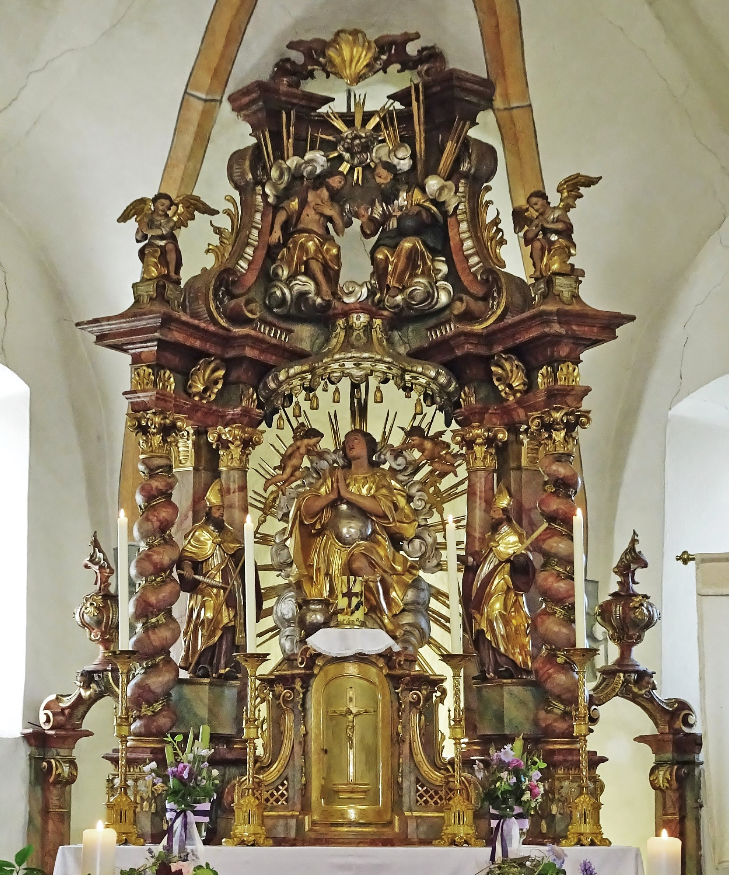 Kath. Pfarrkirche Klein St. Veit (Feldkirchen in Kärnten), der Hochaltar